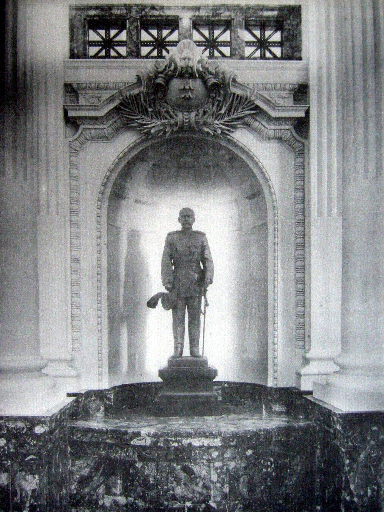 兒玉源太郎銅像，總督府博物館。